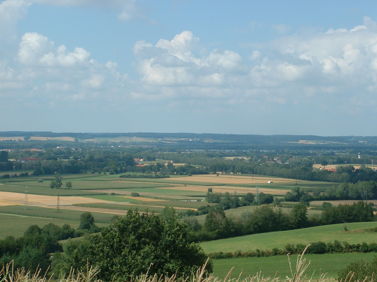 Isartal